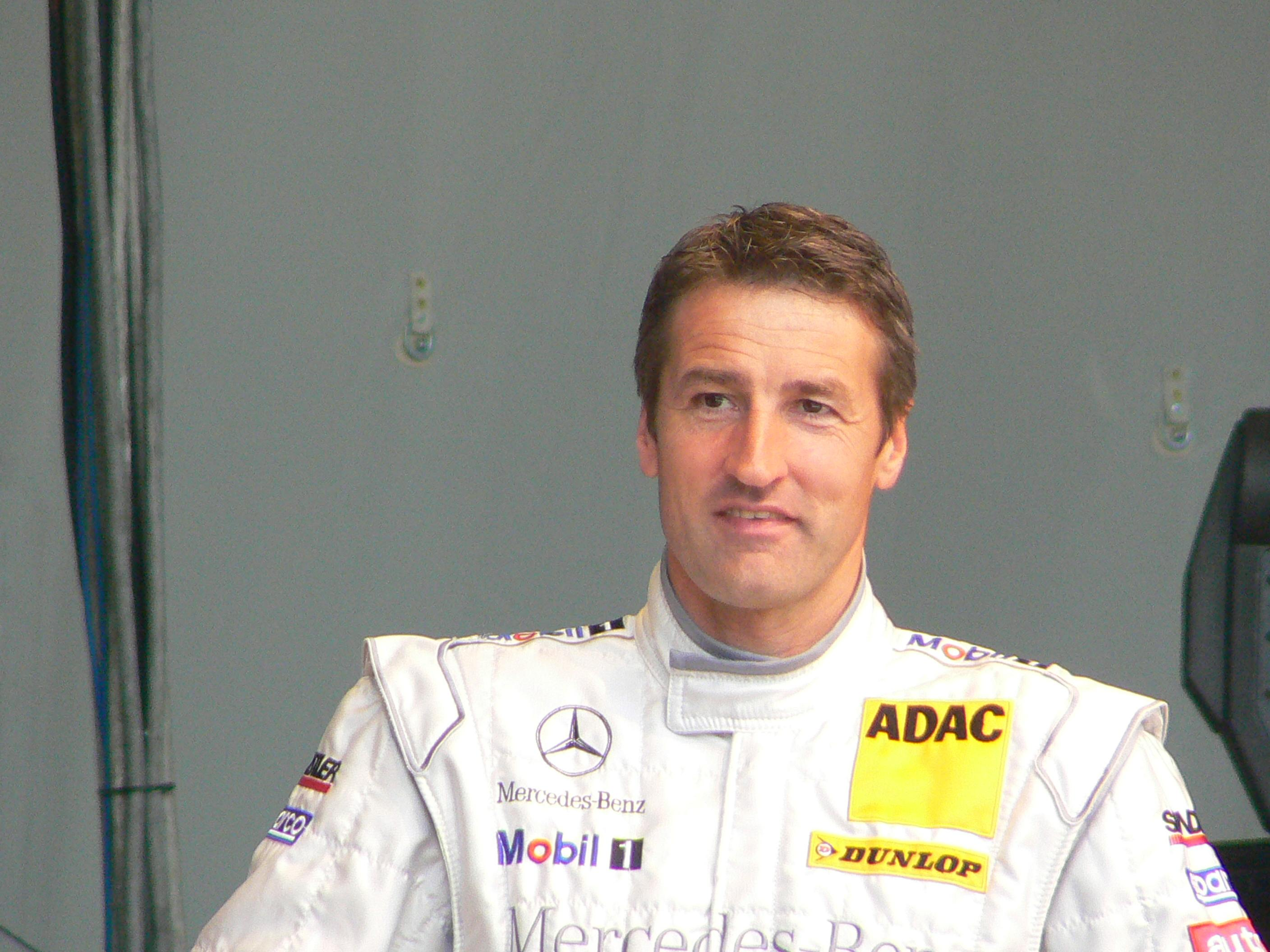 DTM Driver Bernd Schneider